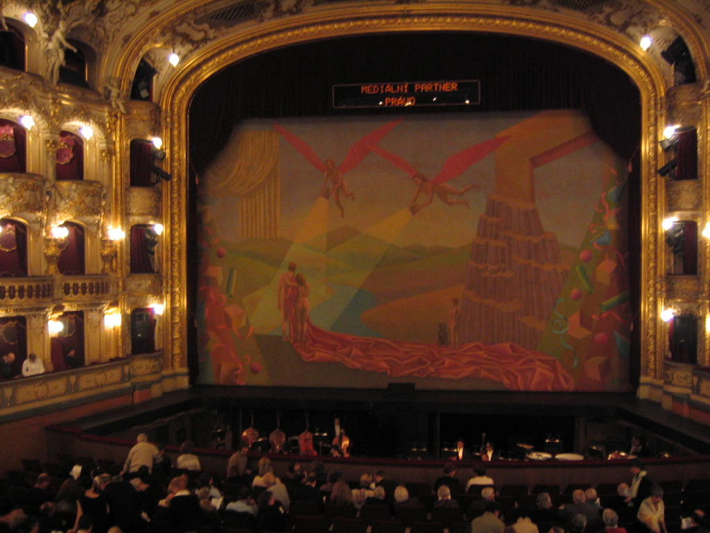 Taken autumn 2005.